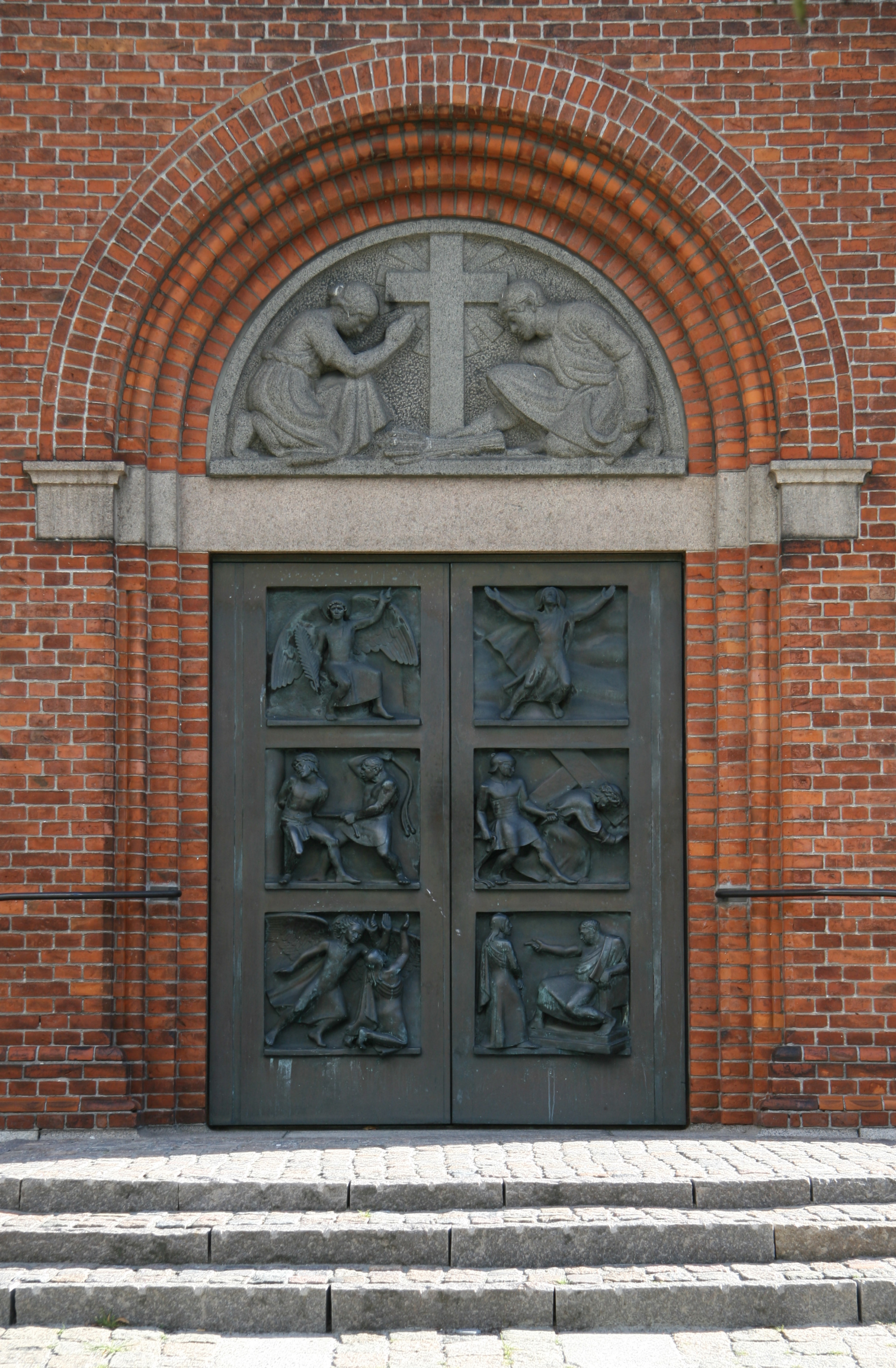 Sundby Kirke, Amager, Copenhagen, Denmark. Entrance portal